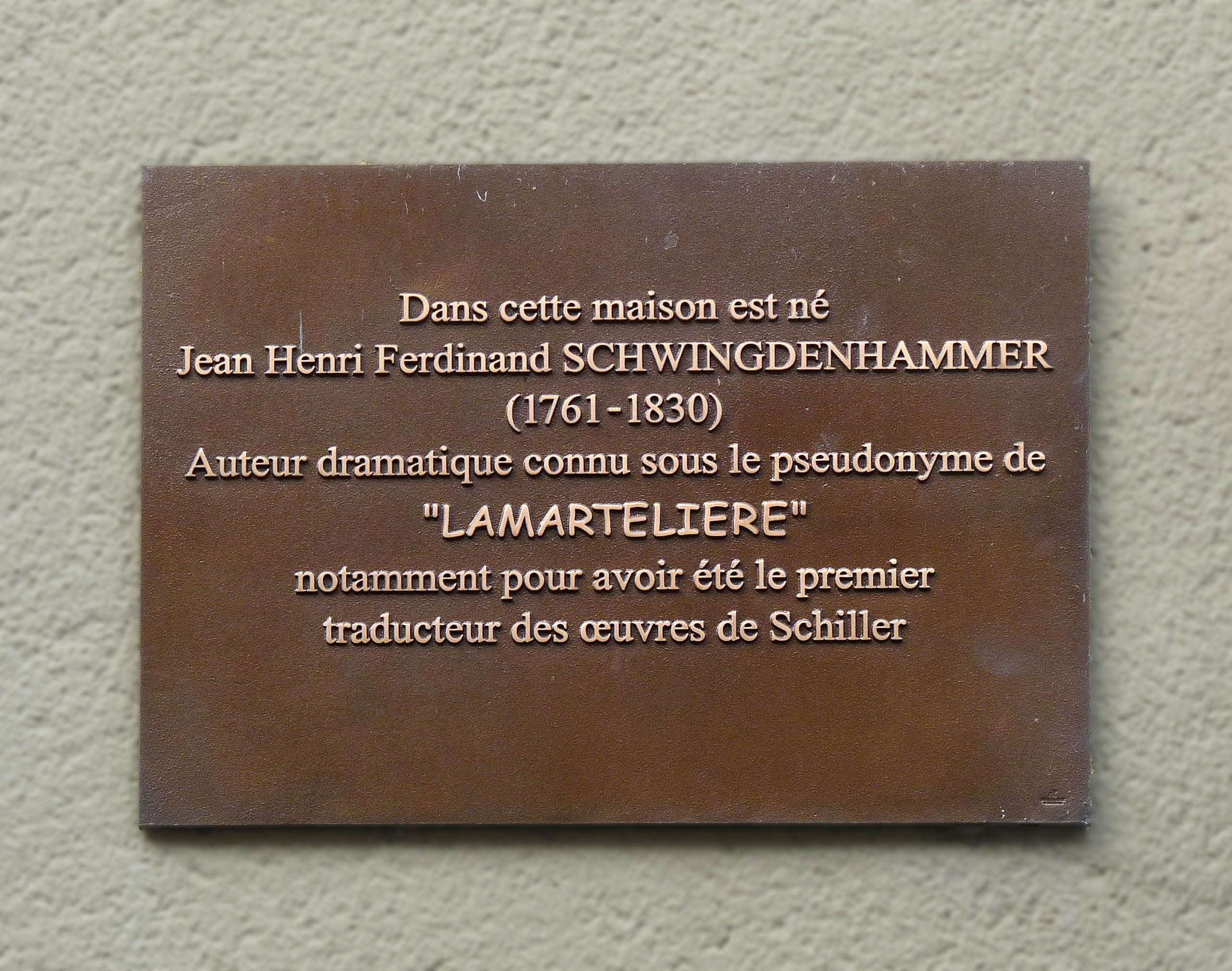 Ferrette (Haut-Rhin), 22 rue du Château : plaque commémorative sur la maison natale du dramaturge Jean Henri Ferdinand Schwin(g)denhammer (ou Lamartelière)